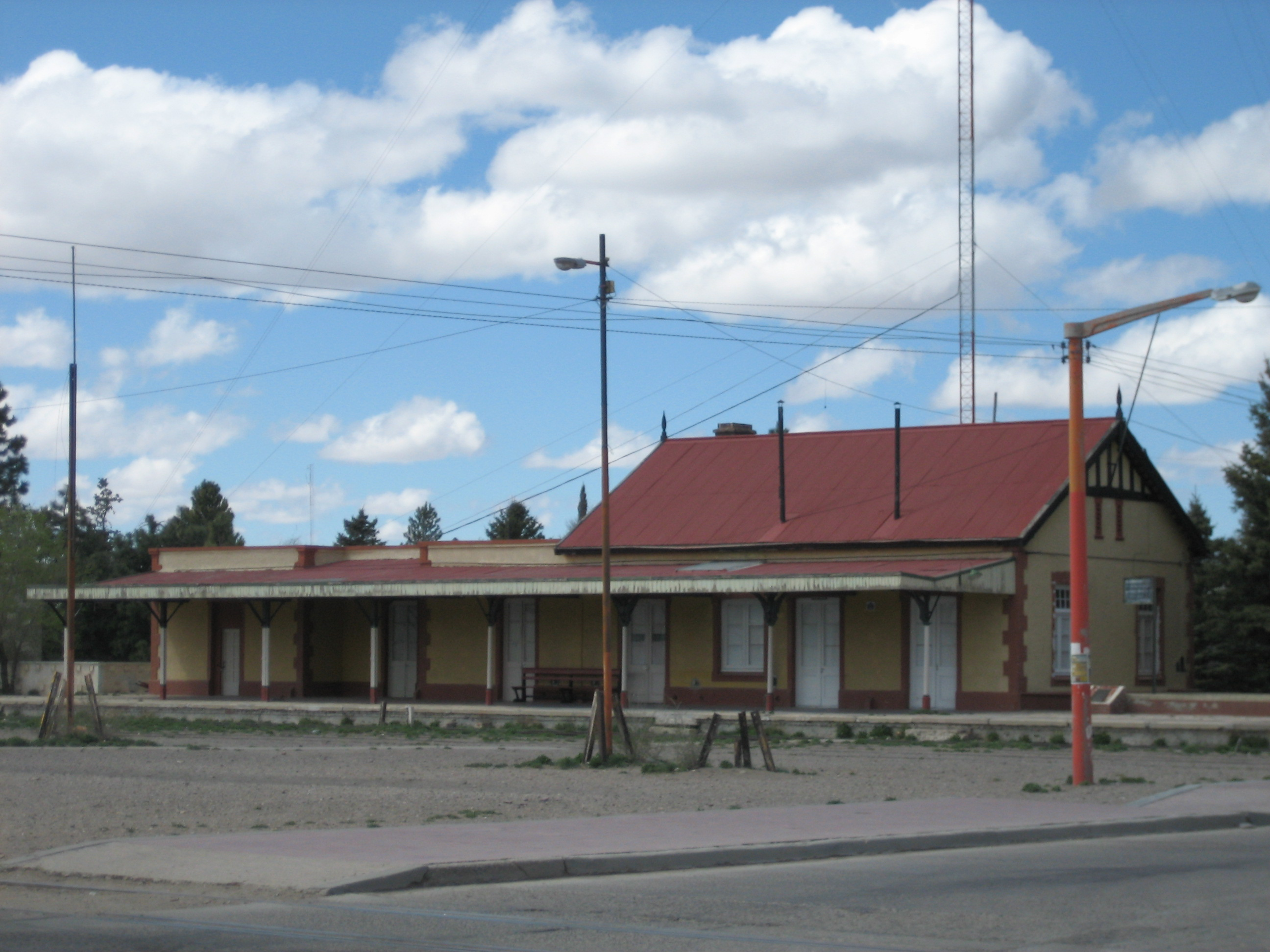 Esta es la estación de la ciudad de Zapala. Tiene un estilo muy atractivo.